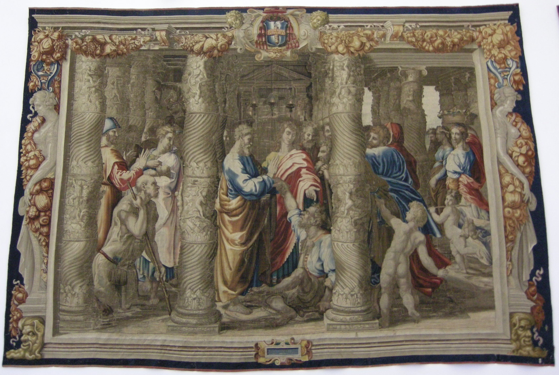 Palazzo Ducale di Urbino - Galleria Nazionale delle Marche - MIBAC This is a photo of a monument which is part of cultural heritage of Italy.